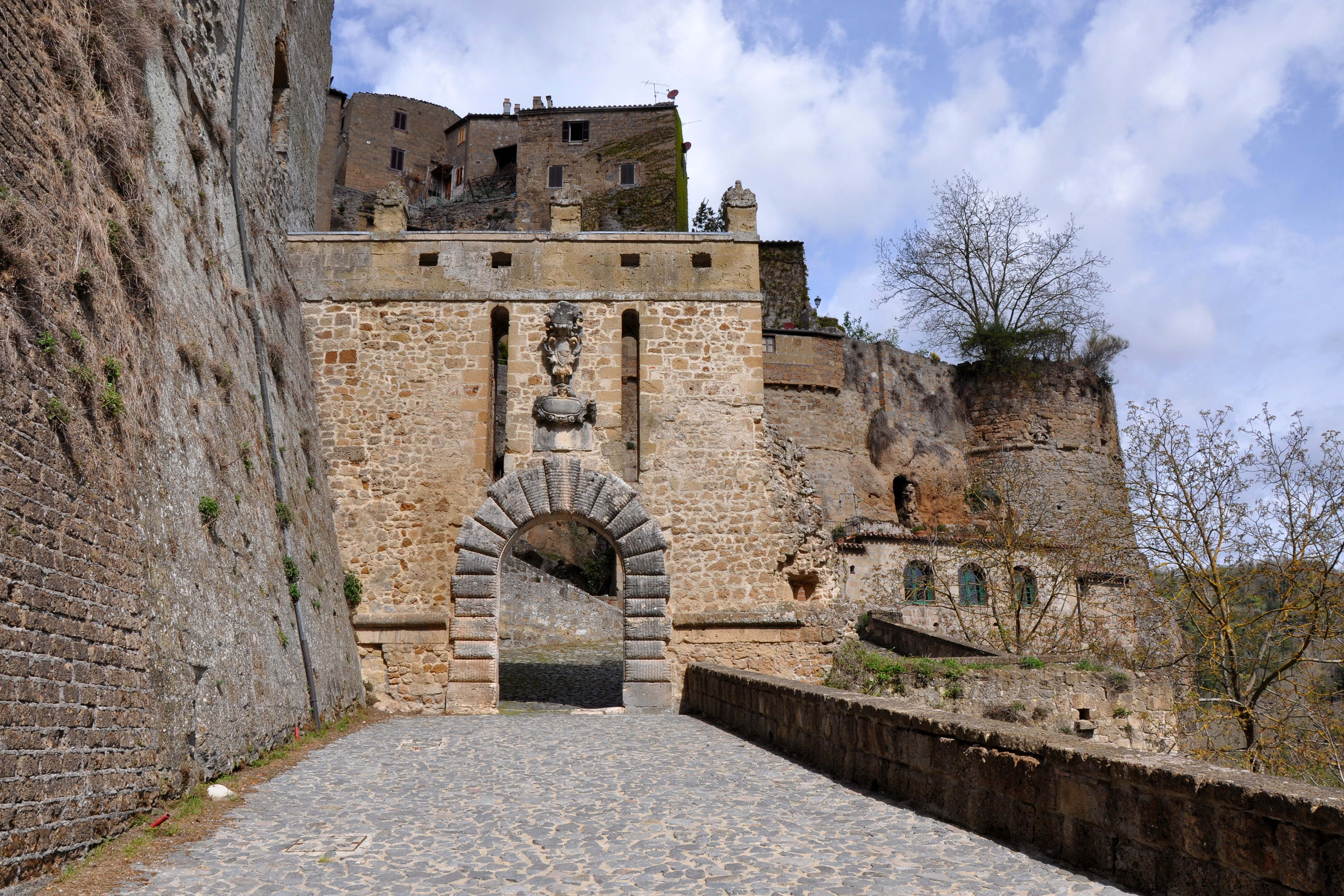 La Porta dei Merli in Sorano (GR) Italia.